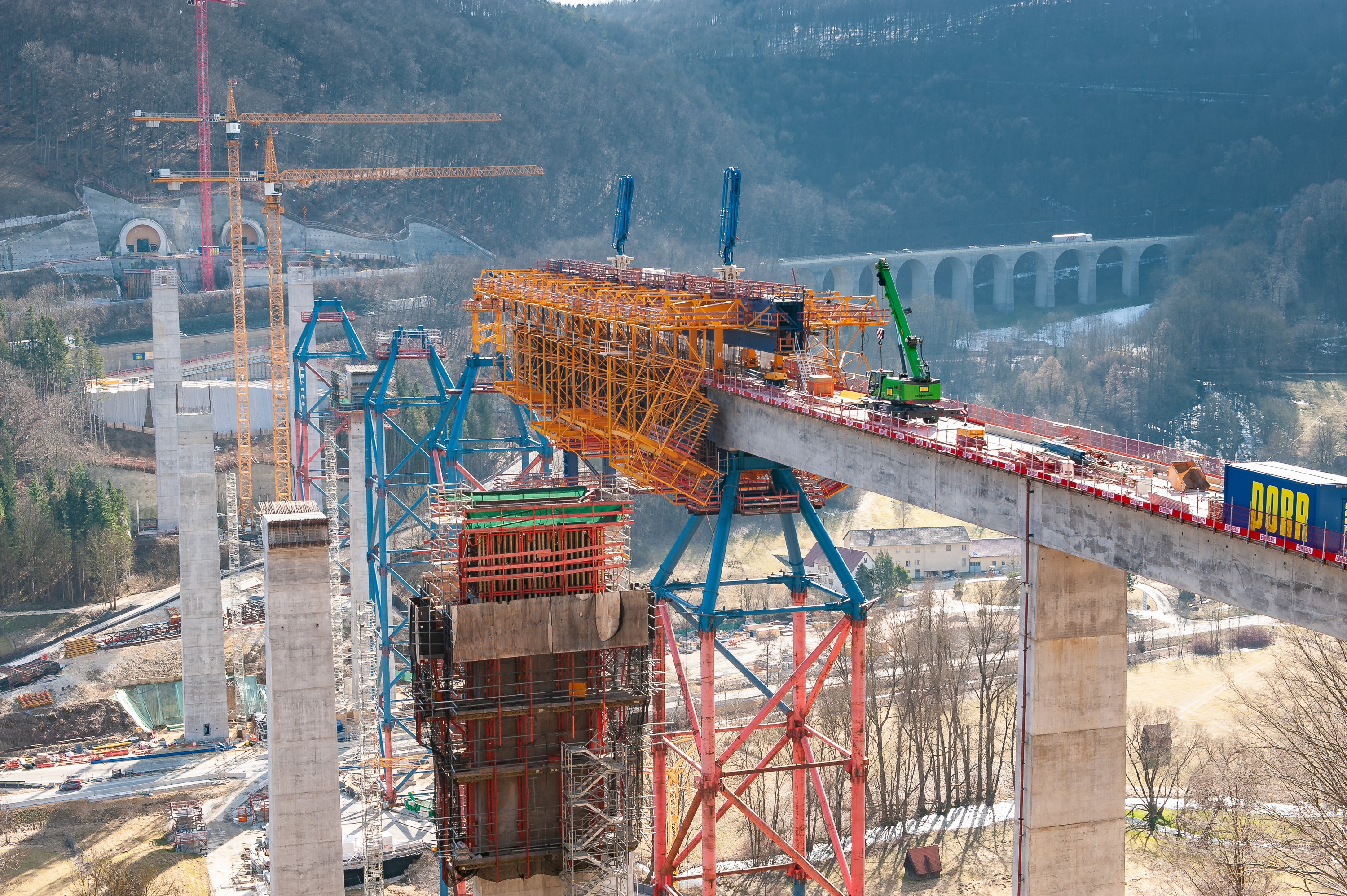 Filstalbrücke (Neubaustrecke Wendlingen–Ulm), Bauzustand Februar 2019, Blick von oberhalb des Portals des Boßlertunnels. Rechts im Hintergrund der Albaufstieg der Autobahn A8